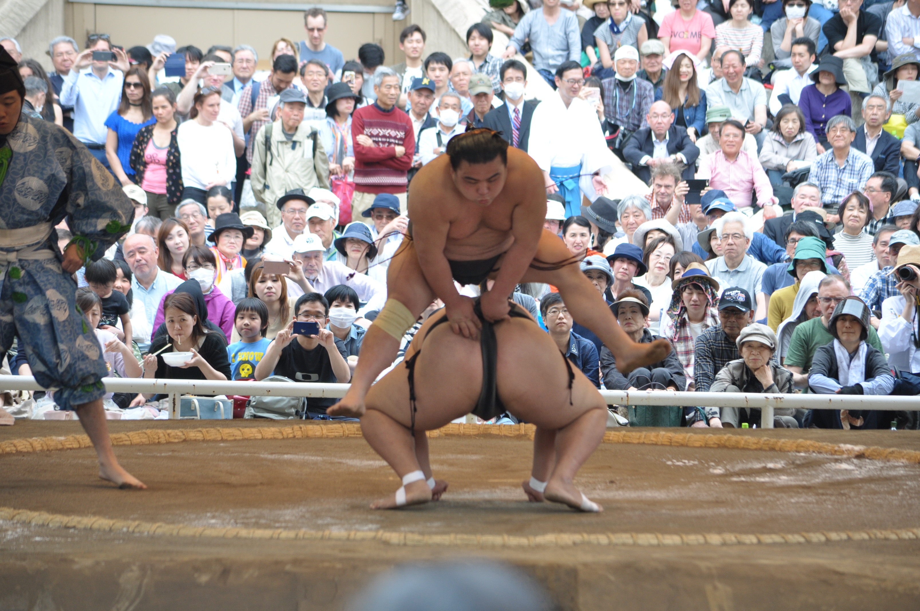 大相撲 初切